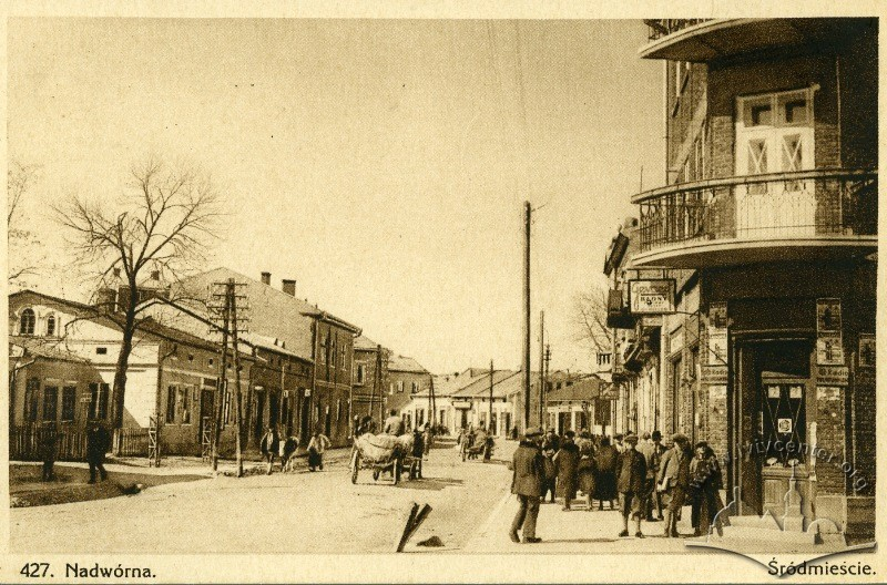 Надвірна, Середмістя. 1932